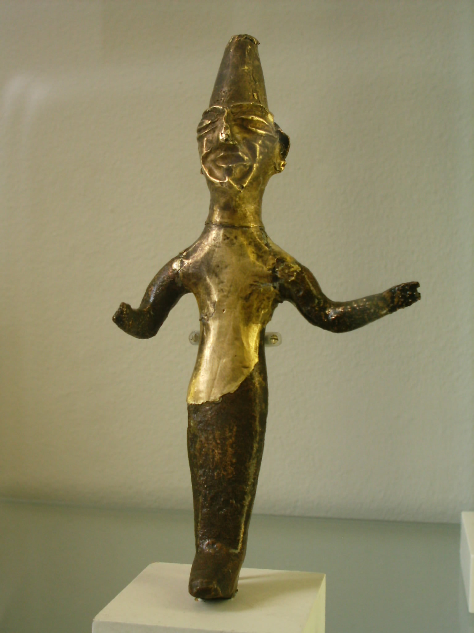 Bronzestatuette eines Mannes mit Goldblech. 2. Jh. V. Chr. Pergamon Museum, Berlin.